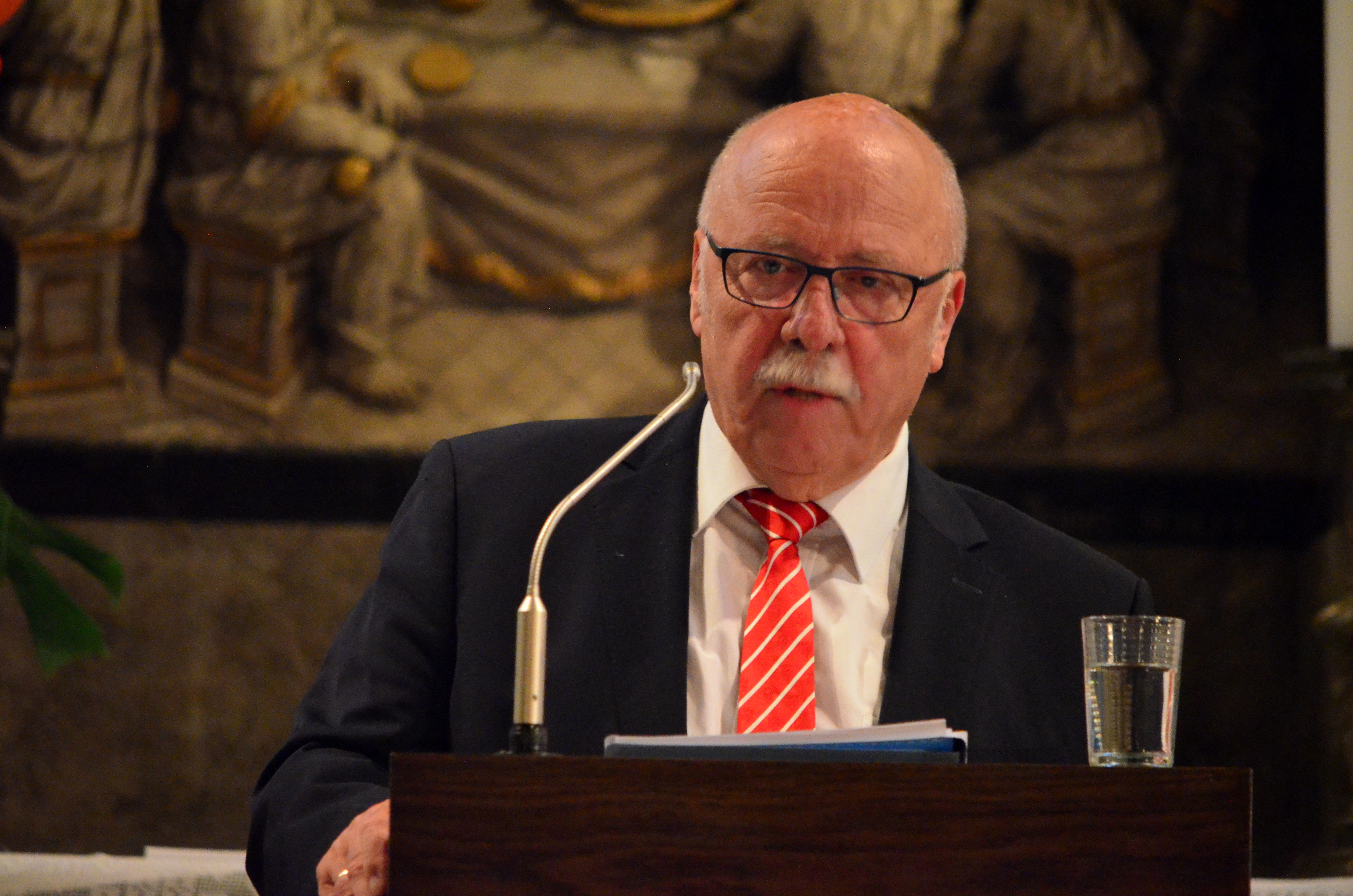 Rainer Zirbeck, Hansebeauftragter der Stadt Braunschweig, bei einem Vortag in der Martinikirche